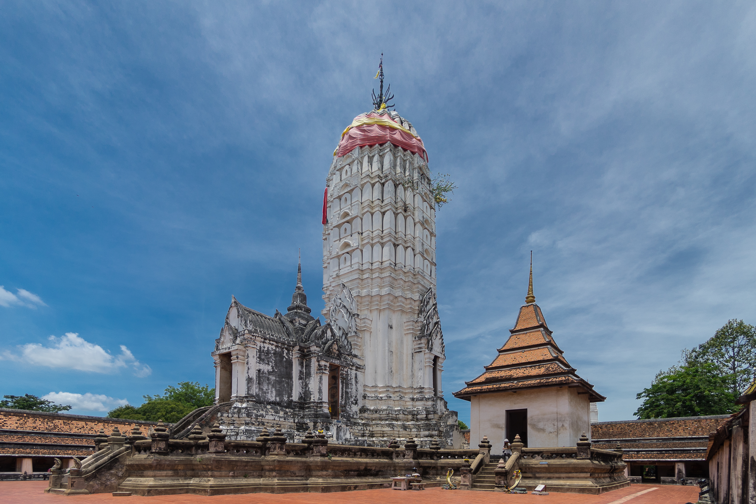 พระปรางค์ประธาน วัดพุทไธยสวรรค์